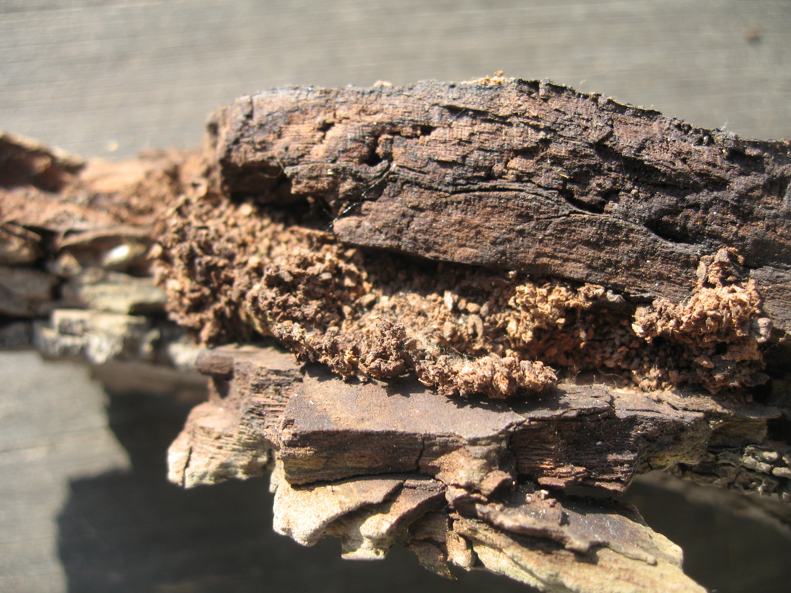 Fraßspuren vom Holzbohrer oder Weidenbohrer in Walnussholz.